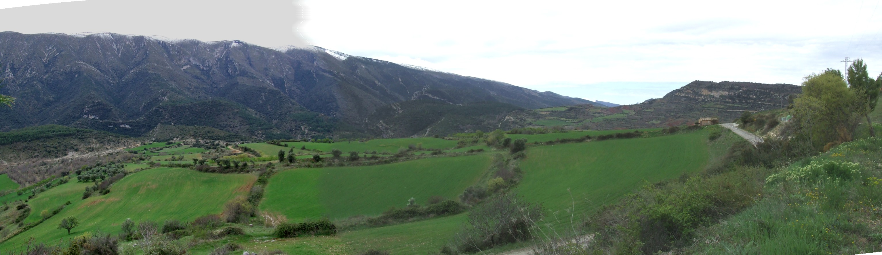 La Feixa, des de prop de Moror (Sant Esteve de la Sarga, Pallars Jussà)